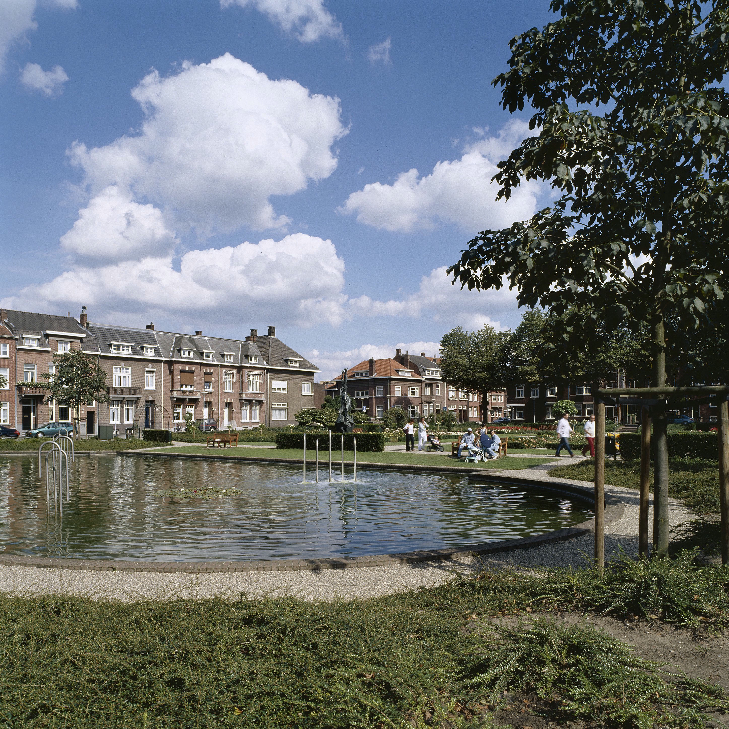 Rosarium: Overzicht van het rosarium in het noord-oosten van het oude centrum, achter de Sint-Martinuskerk in de Rosariumbuurt (opmerking: Foto's verkregen uit privé-collectie van fotograaf P. van Galen.)